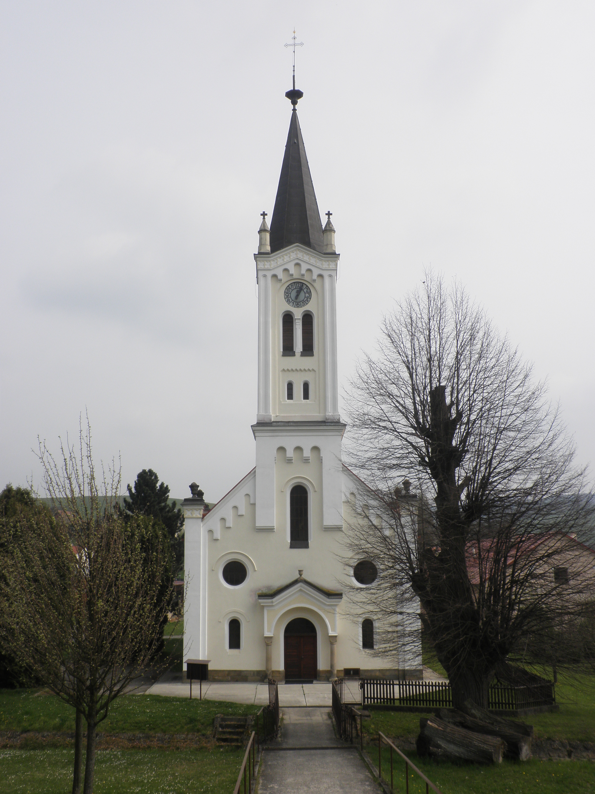 Evangelický kostel v Jasenné (Zlínský kraj) z r. 1833